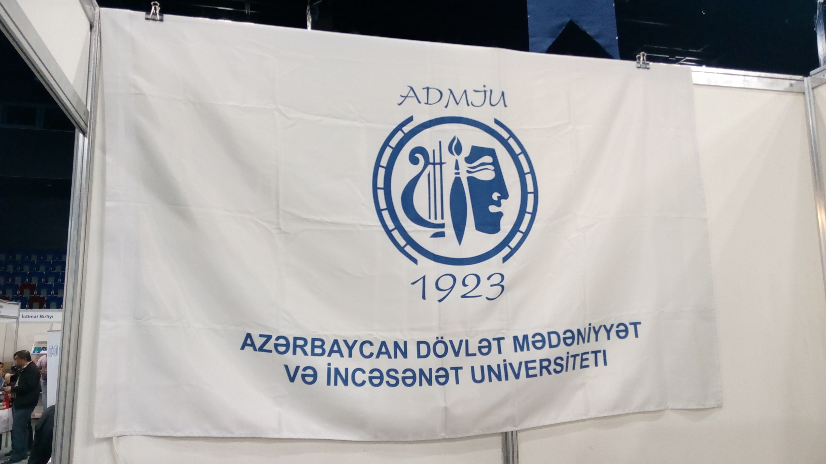 V Bakı Beynəlxalq Kitab Sərgi-Yarmarkası